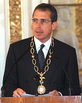 El presidente Carlos Menem recibió el saludo protocolar del presidente de México, Ernesto Zedillo Ponce de León.